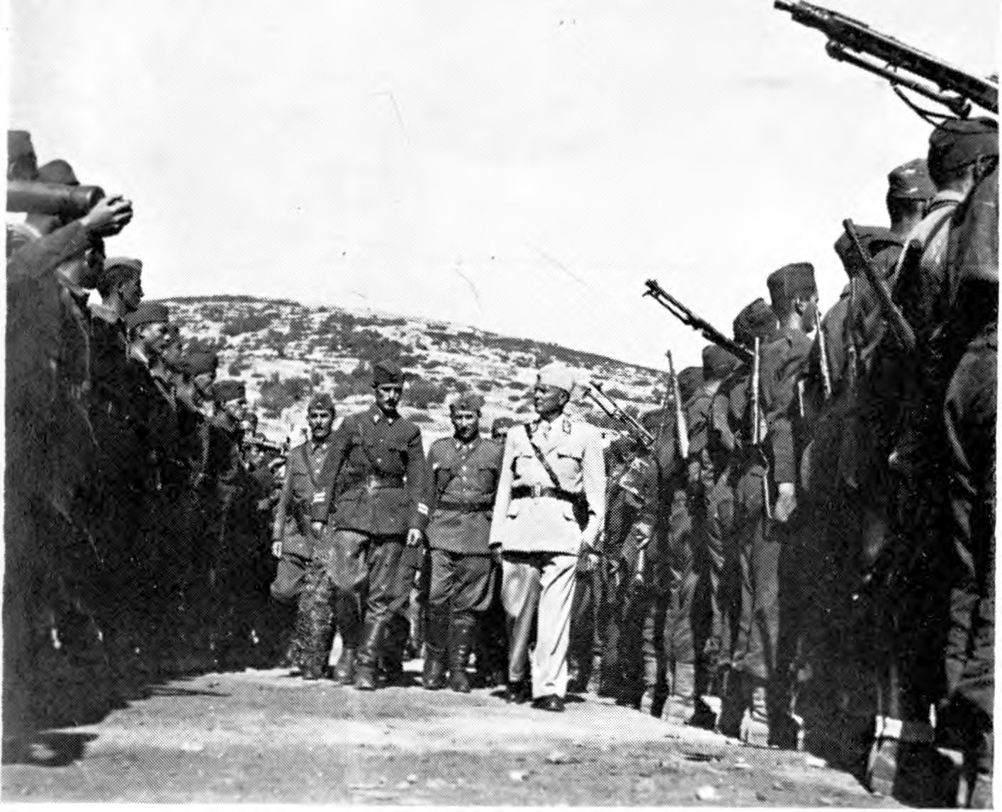 Srpskohrvatski / српскохрватски: Maršal Tito vrši smotru I dalmatinske brigade na Visu, u leto 1944.